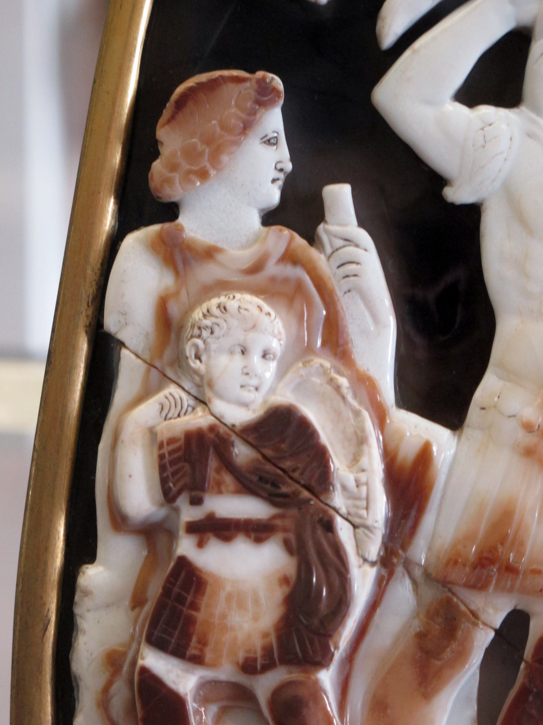 Arte romana, gran cammeo della ste chapelle con esaltazione della dinastia giulio-claudia, 23 dc ca., livilla e caio cesare